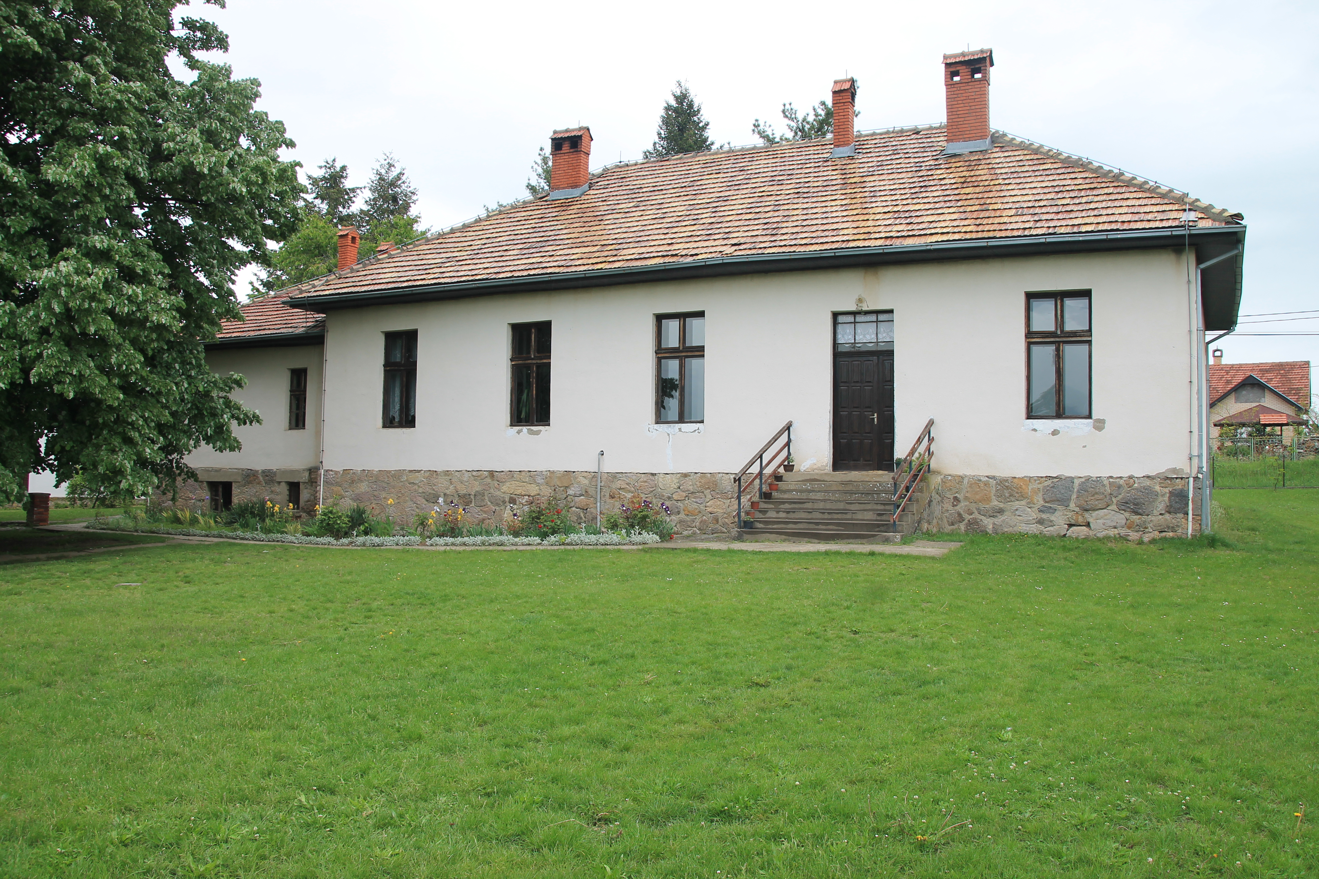 Stara škola u Ovsištu